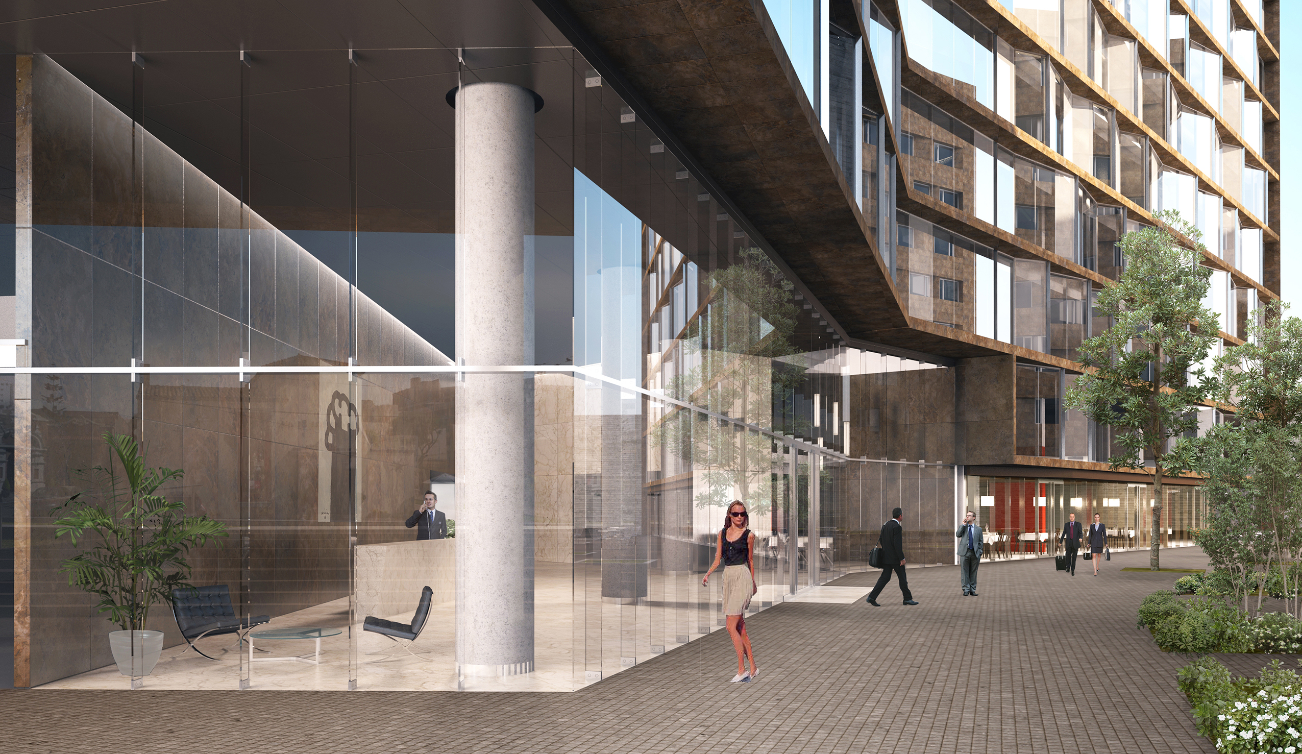 Lobby de edificio de oficinas e ingreso a patio urbano, Alfredo Benavides y Cynthia Watmough, Ruth Alvarado y Oscar Borasino.